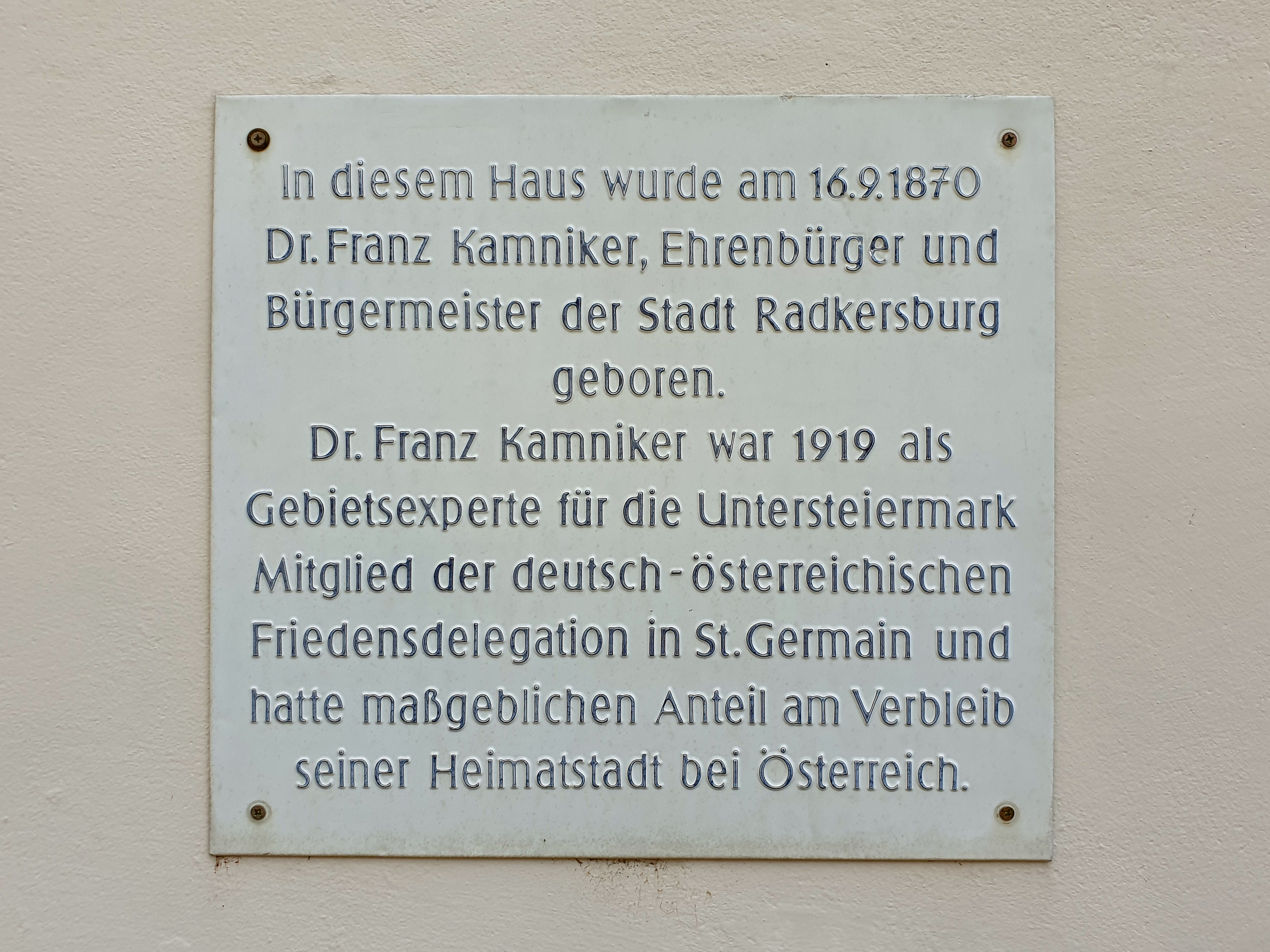 Gedenktafel am Geburtshaus von Franz Kamniker, Murgasse 6, Bad Radkersburg.